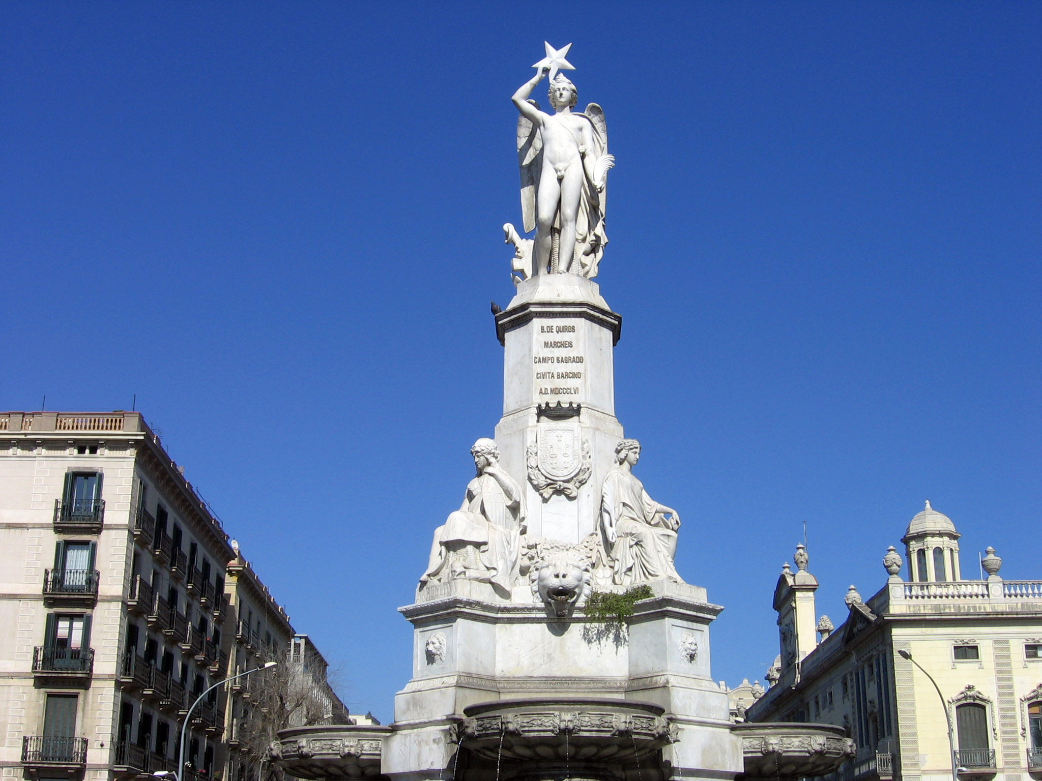 Fuente del Genio Catalán.